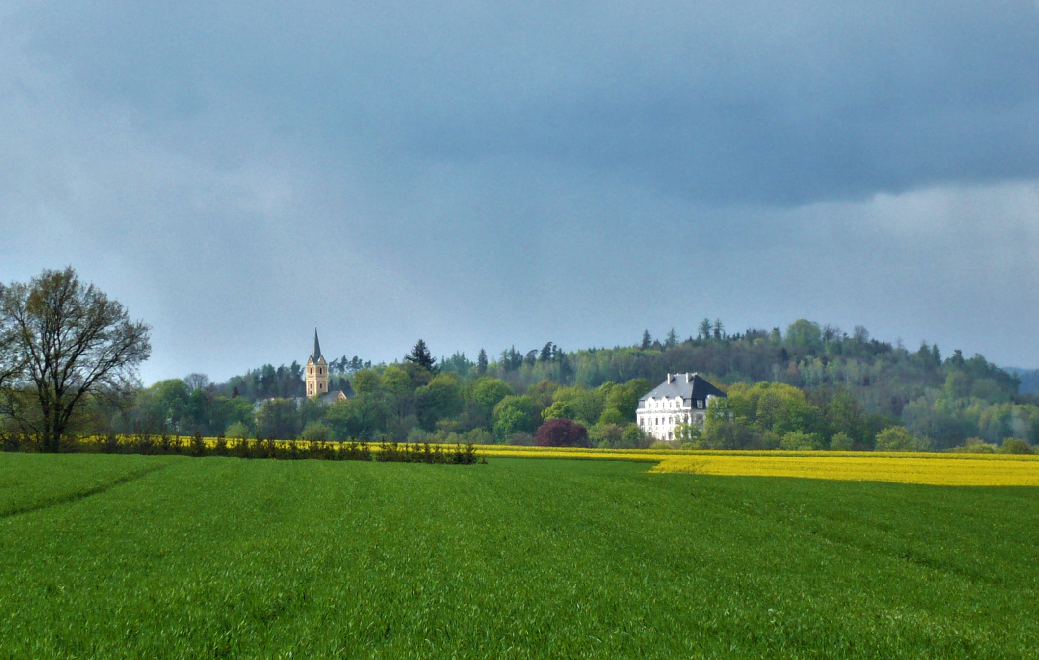 Piszkowice